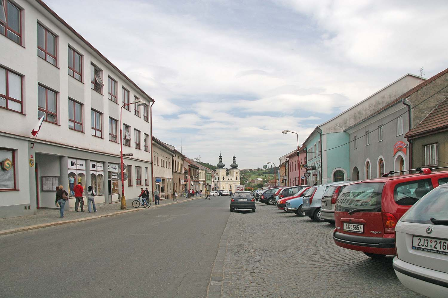 Bystřice nad Pernštejnem - náměstí, district Žďár nad Sázavou